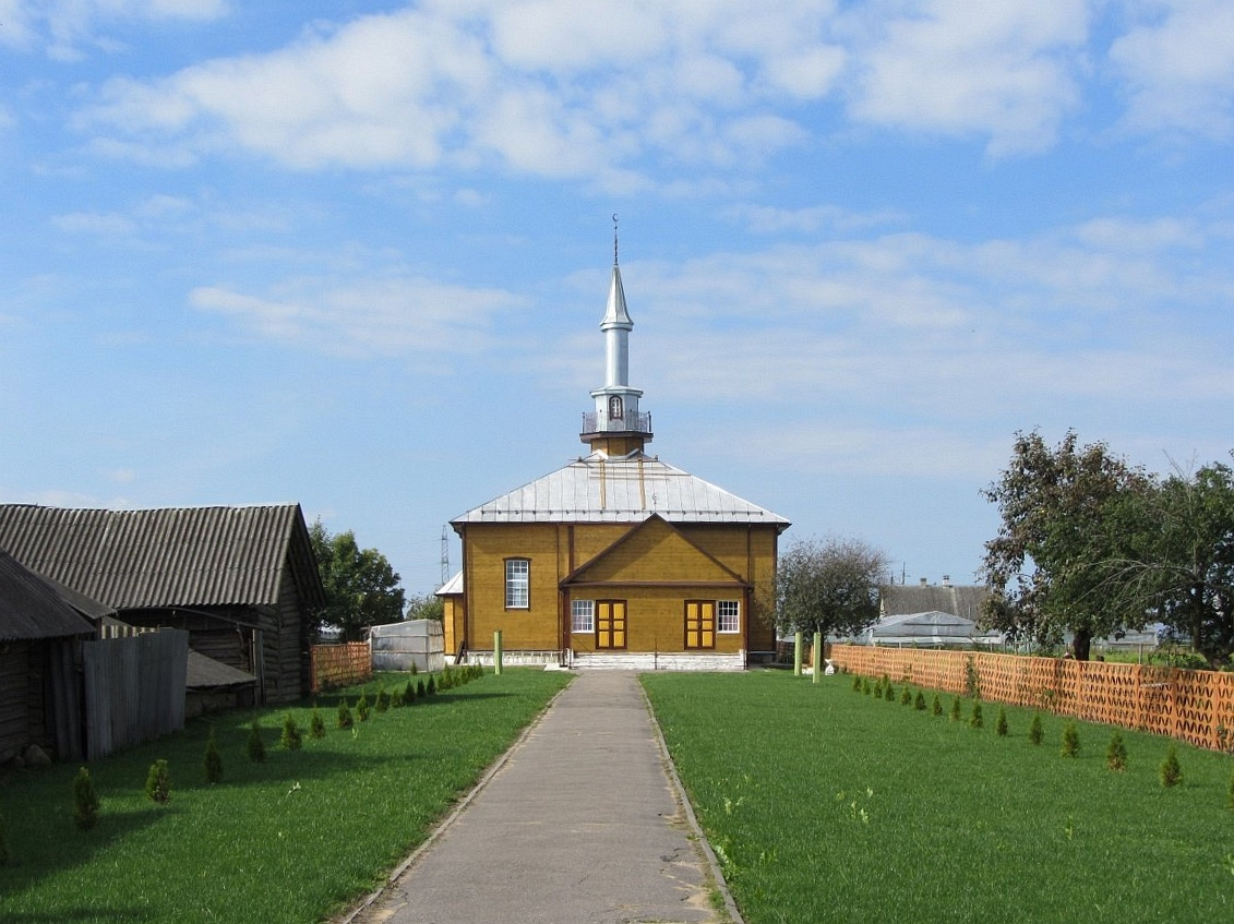 Забудова Іўя